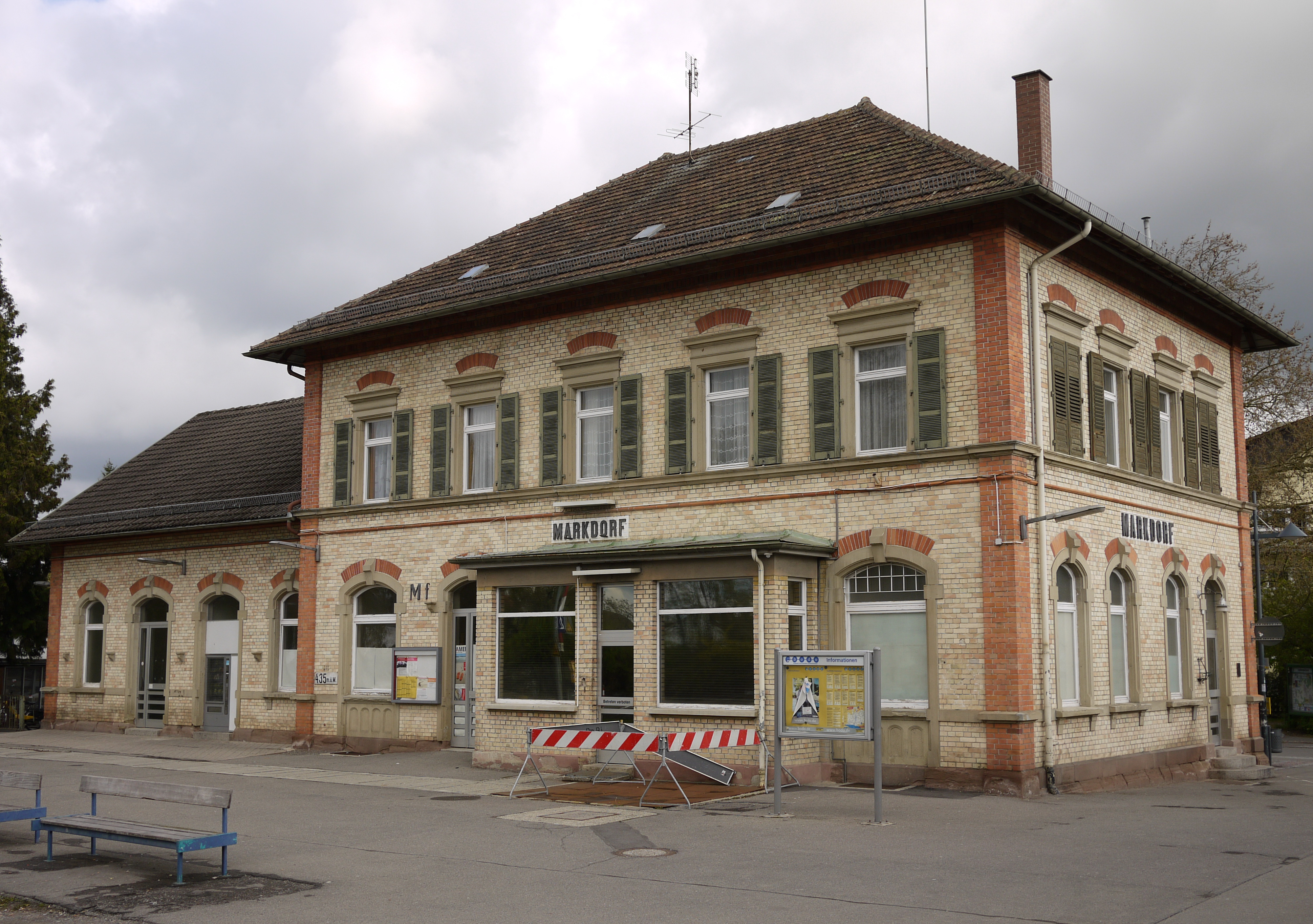 Der Markdorfer Bahnhof